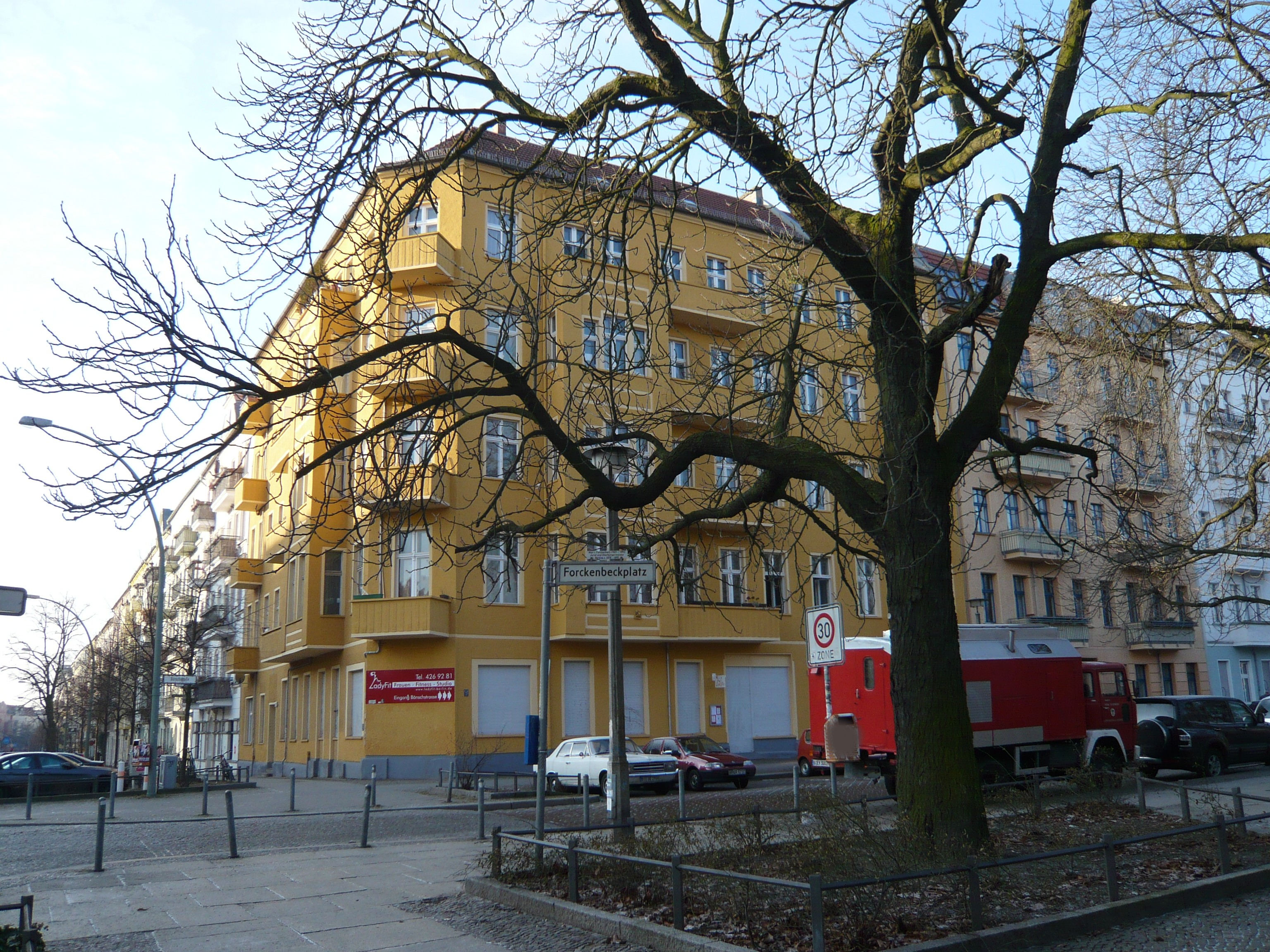 Forckenbeckplatz im Winter: Randbebauung (2)